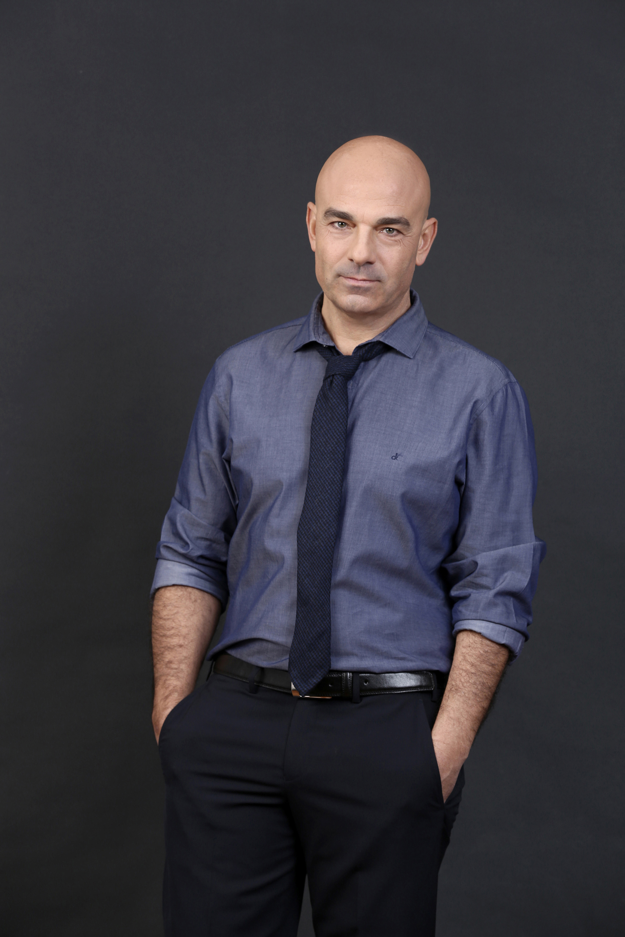 foto di Massimo Romeo Piparo regista teatrale. foto di Iwan Palombi